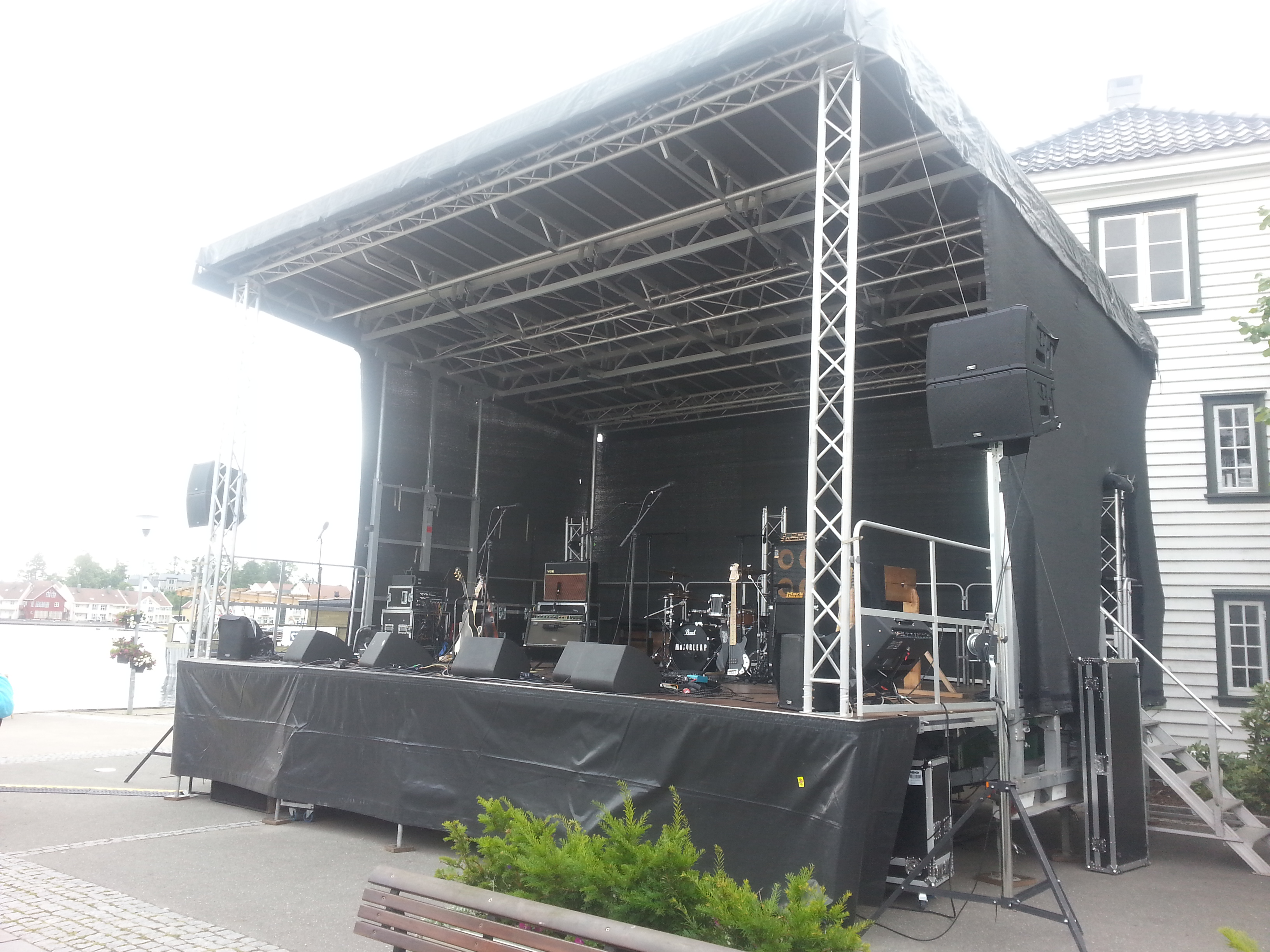 Scene på Kaperdagene 2016 i Farsund